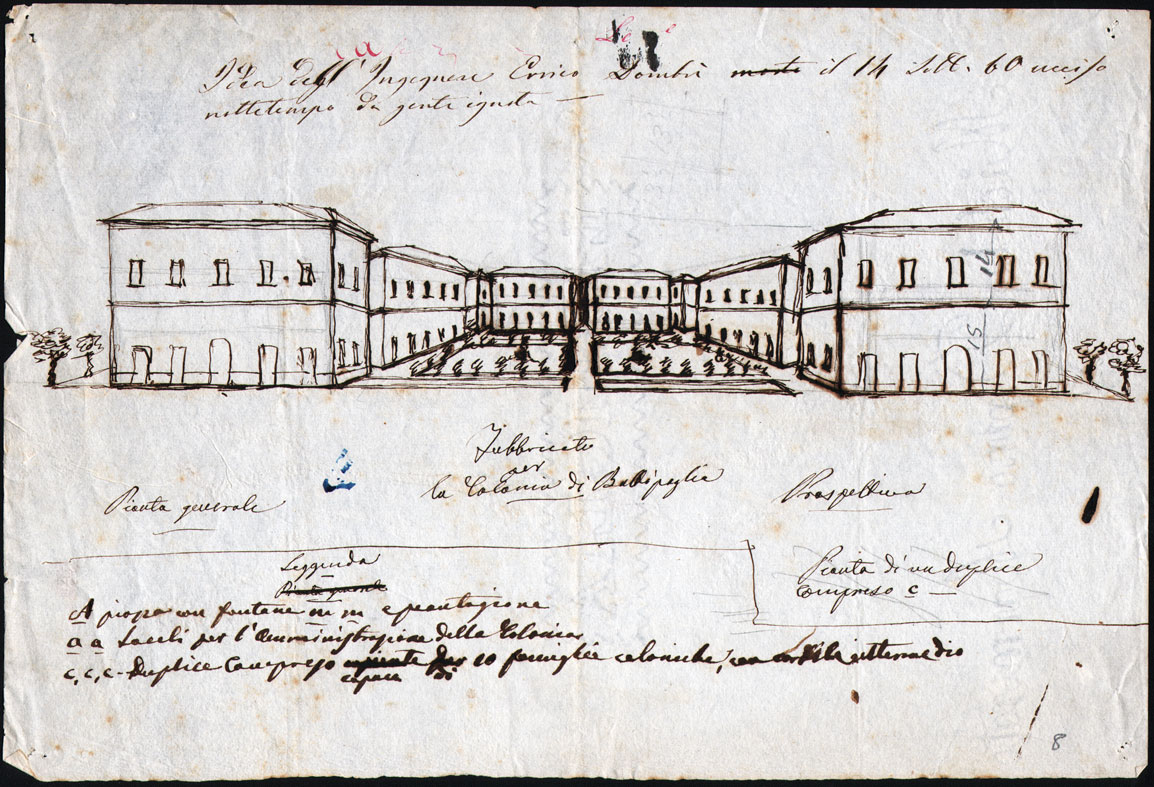 Prospetto delle comprese della colonia di Battipaglia. Il bozzetto mostra in prospettiva la pianta generale di un duplice compreso, fabbricato per la colonia di Battipaglia, dell'Ingegnere Errico Dombrè che fu ucciso il 14 Settembre del 1860 "nottetempo da gente ignota". Nella legenda è citata la presenza di una piazza con fontana e piantagioni e di locali per l'amministrazione della Colonia. Questo bozzetto si trova nell'Archivio di Stato di Salerno, nella sezione Genio civile, busta 135 fascicolo 240.